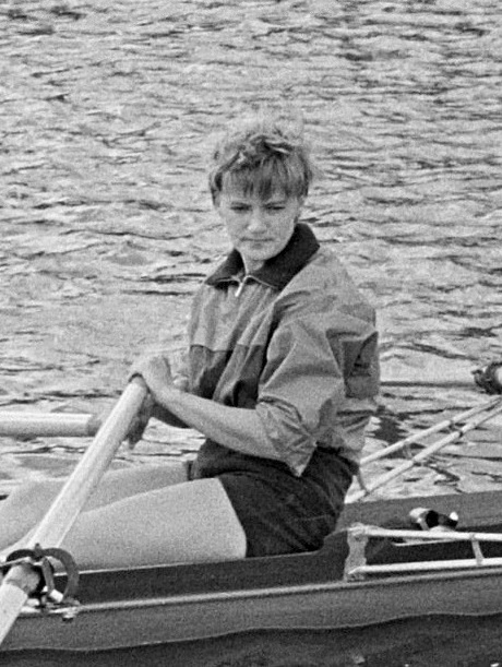 Europese Roeikampioenschappen, dames.